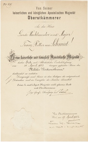 Urkunde im Namen von Franz Joseph I. (Kaiser von Österreich 1848-1916) über die Verleihung des österreichischen Militärverdienstkreuzes an den 1892 geadelten Garde-Wachtmeister und Major Franz Ritter von Schmid. Ausgestellt Wien, 27. April 1902, mit Unterschrift eines Beamten des k.u.k. Oberstkämmereramtes. Papier, Format ca. 38 x 24,7 cm.